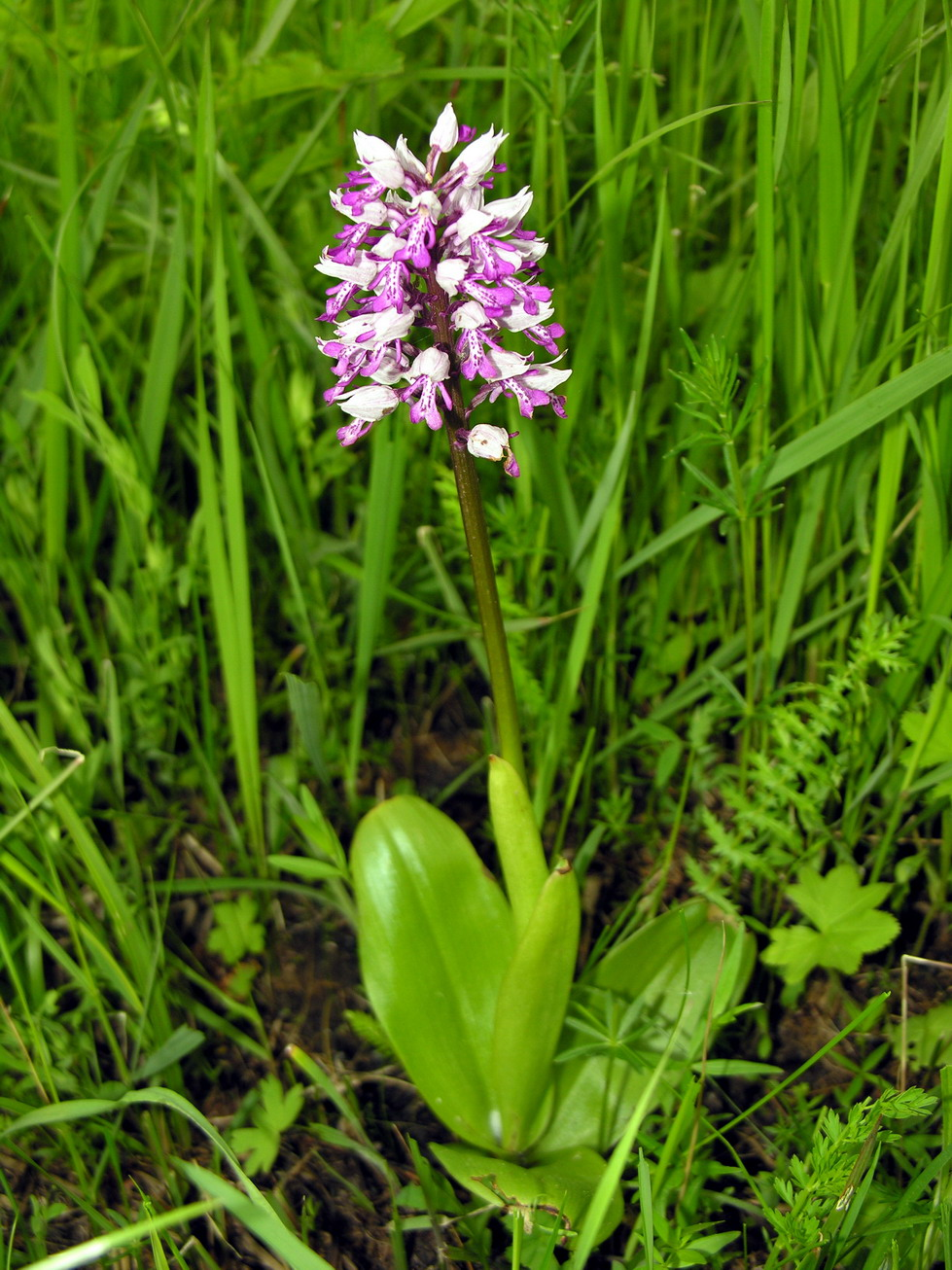 Šalmuotoji gegužraibė (Orchis militaris) Šeima. Gegužraibiniai (Orchidaceae) Foto: Algirdas, 2006 m. birželio 8 d.